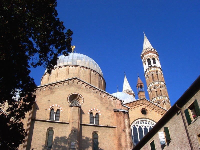 Padova - Basilica di S. Antonio